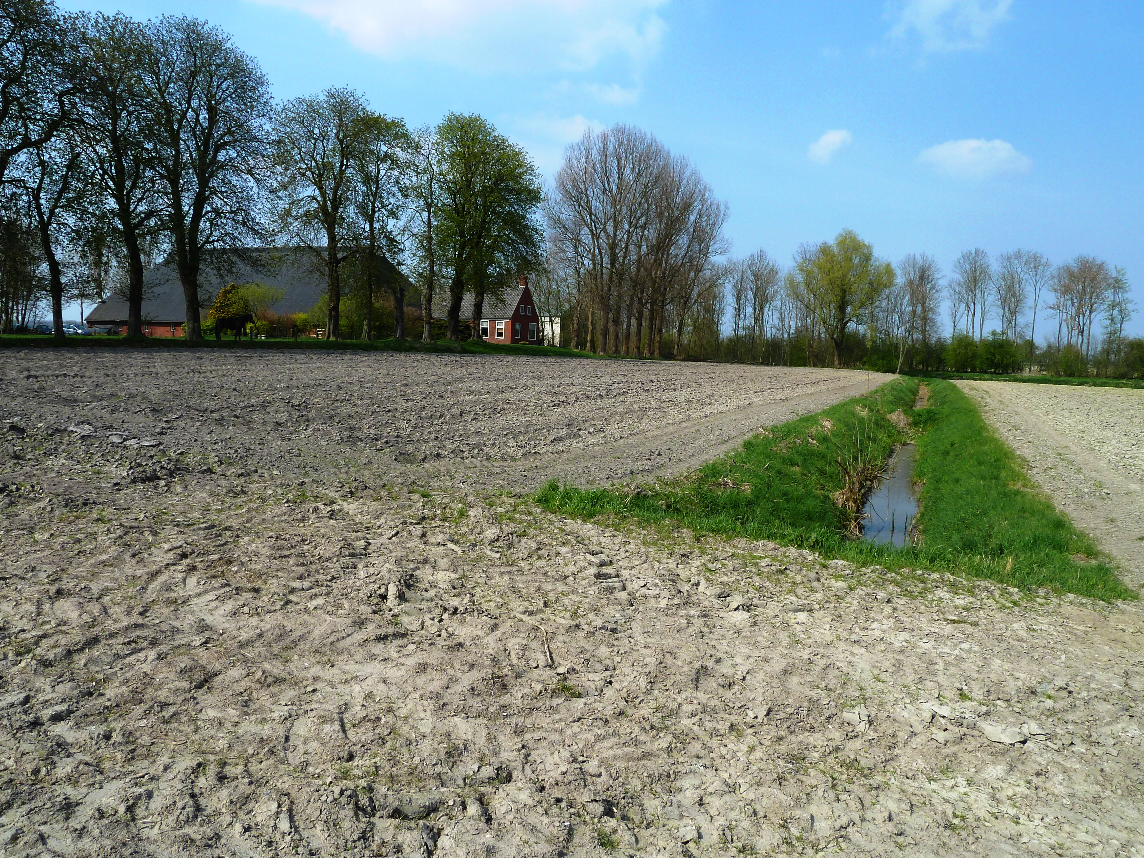 Boerderij Lutke Saaksum op de wierde van Lutke Saaxum (Winsum, Groningen, Nederland).